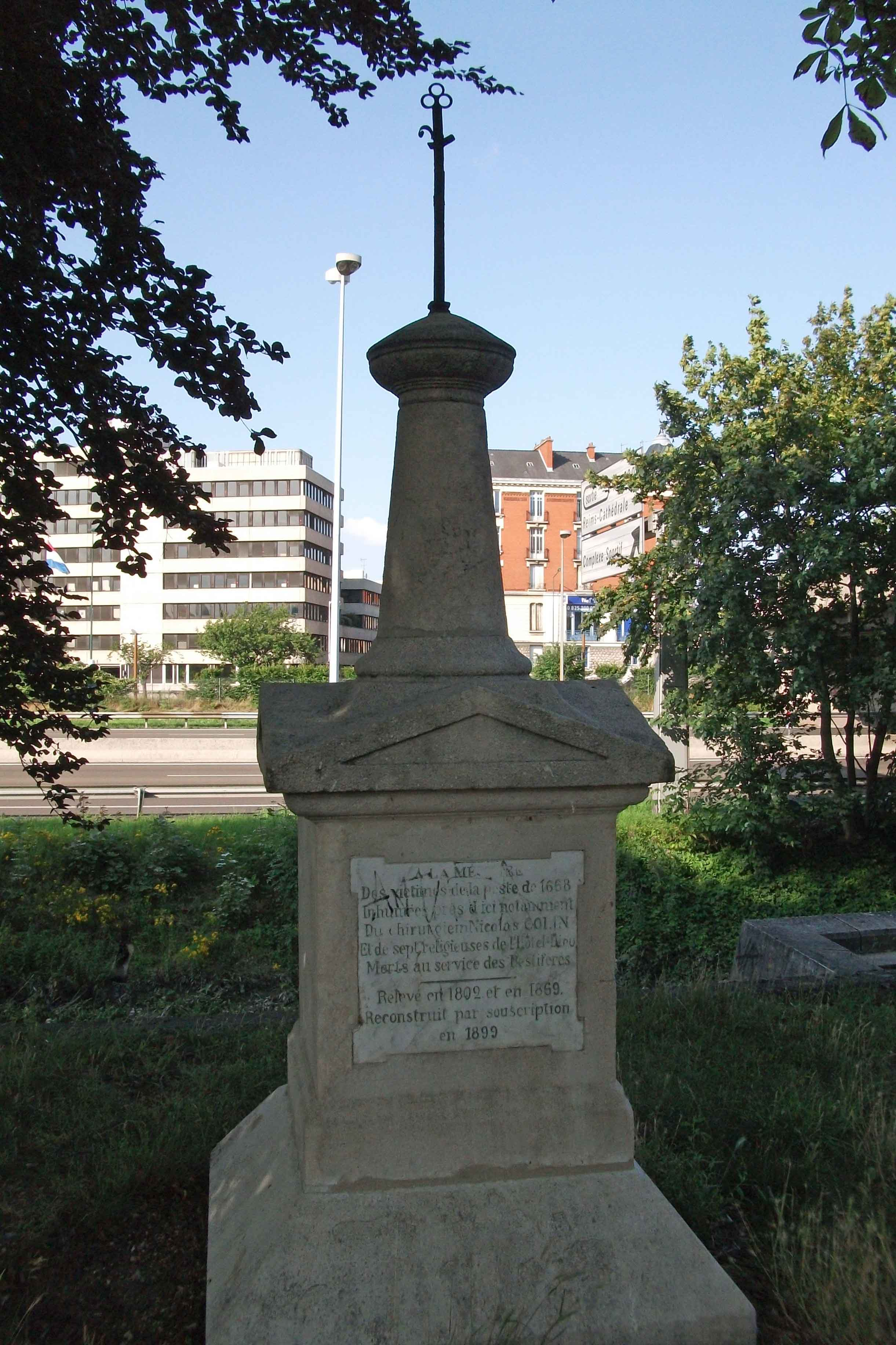 Monument commémorant la Peste de 1668 à Reims, elle se trouve à l'endroit où était une léproserie. le texte sur la plaque "à la mémoire des victimes de la peste de 1668 inhumés près d'ici notamment du chirurgien Nicolas Colin et de sept religieuses de l'Hôtel Dieu morts au service des pestiferés". La croix métallique qui couronnait l'édifice a été mutilée.